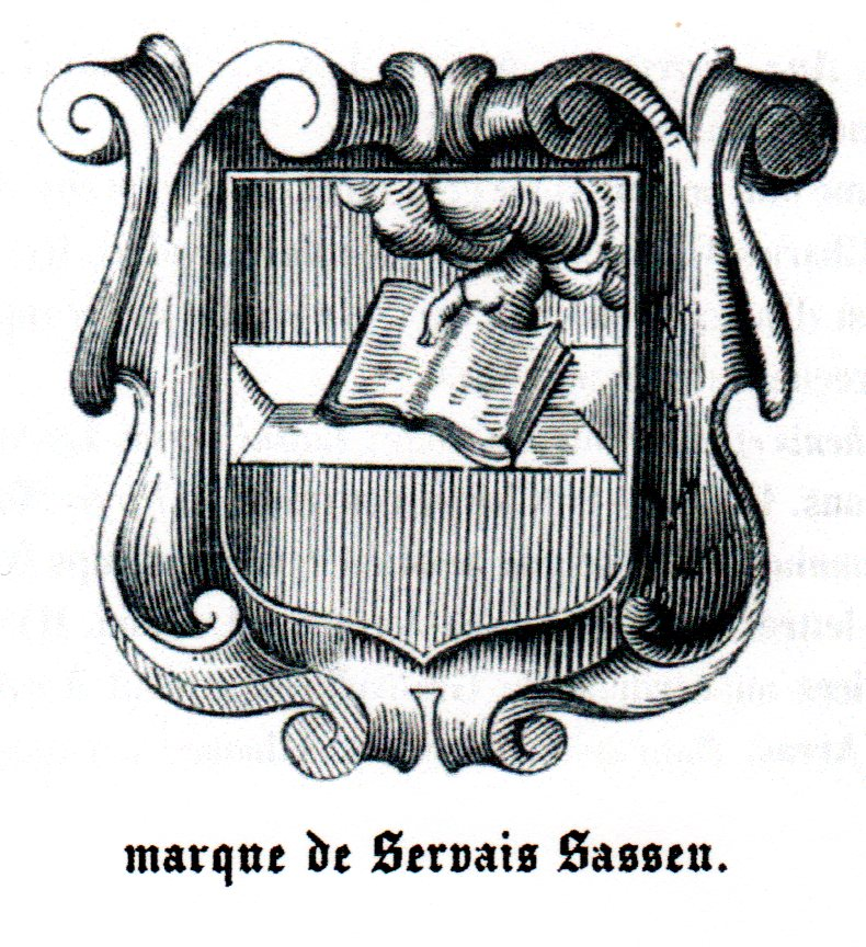 Marque typographique des imprimeurs SASSENUS de Louvain, aux seixième et dix-septième siècles.